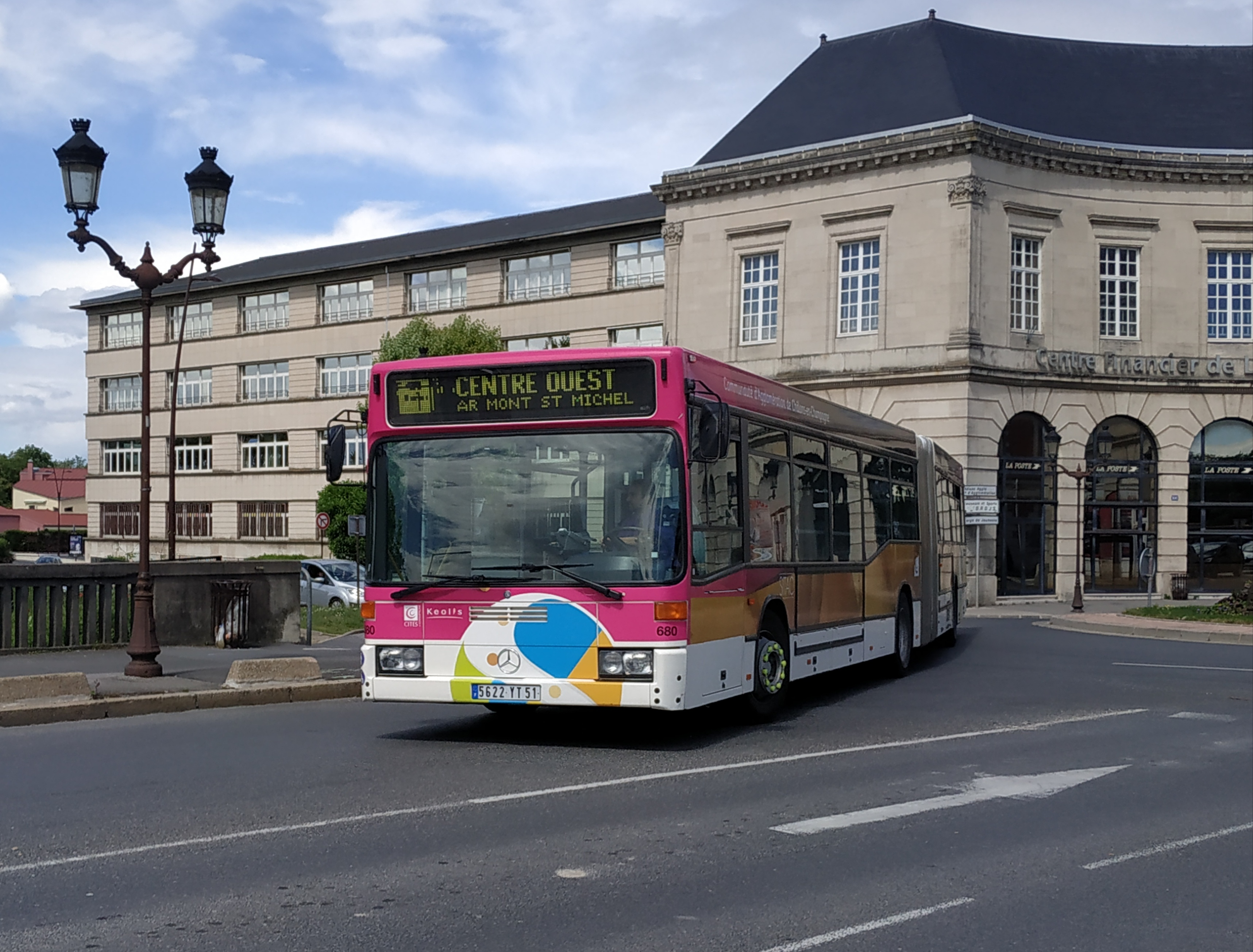 Mercedes-Benz O405 G en circulation sur le SITAC à Châlons-en-Champagne